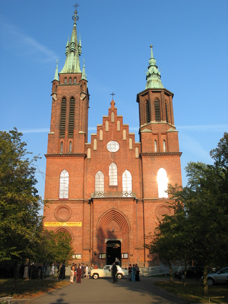 Kościół św. Wojciecha w Łodzi